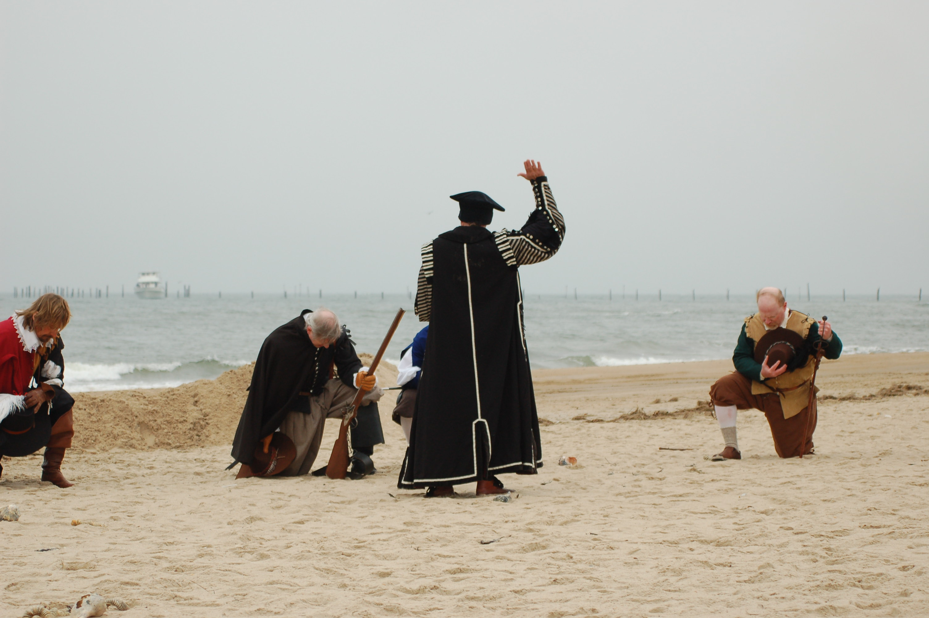 Actors for re-enactment